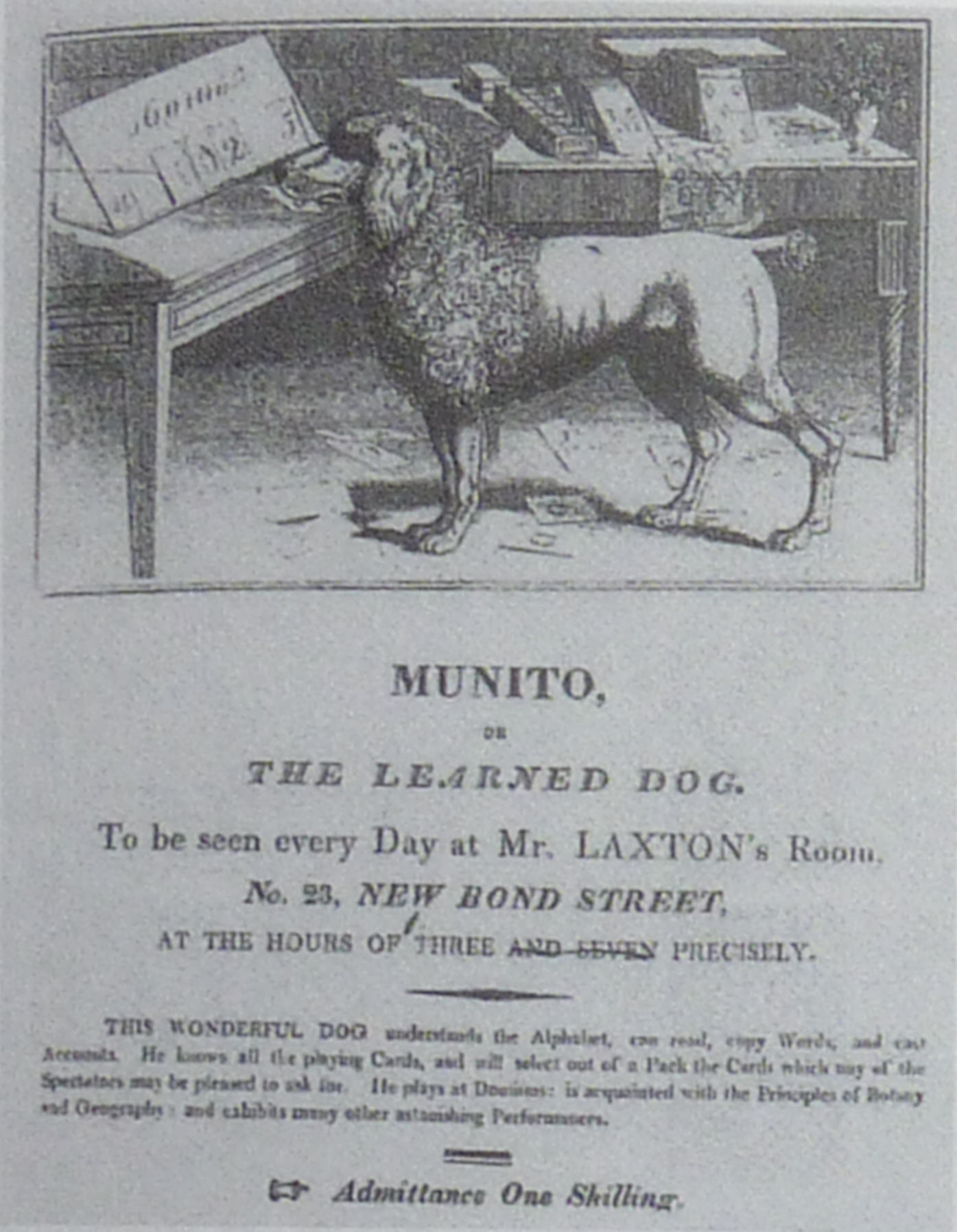 Munito I. mit Löwenschur, Werbung für die Auftritte in der New Bond Street in London